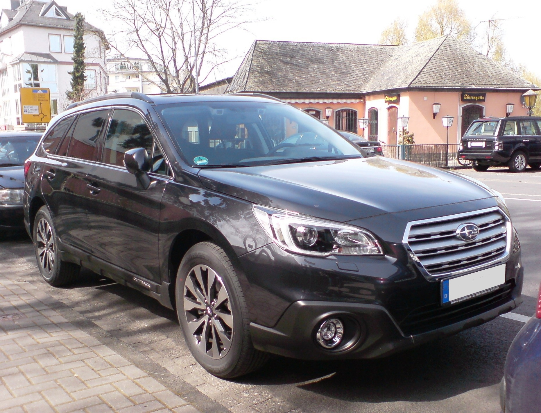 Subaru Outback Kombi (seit 2015)